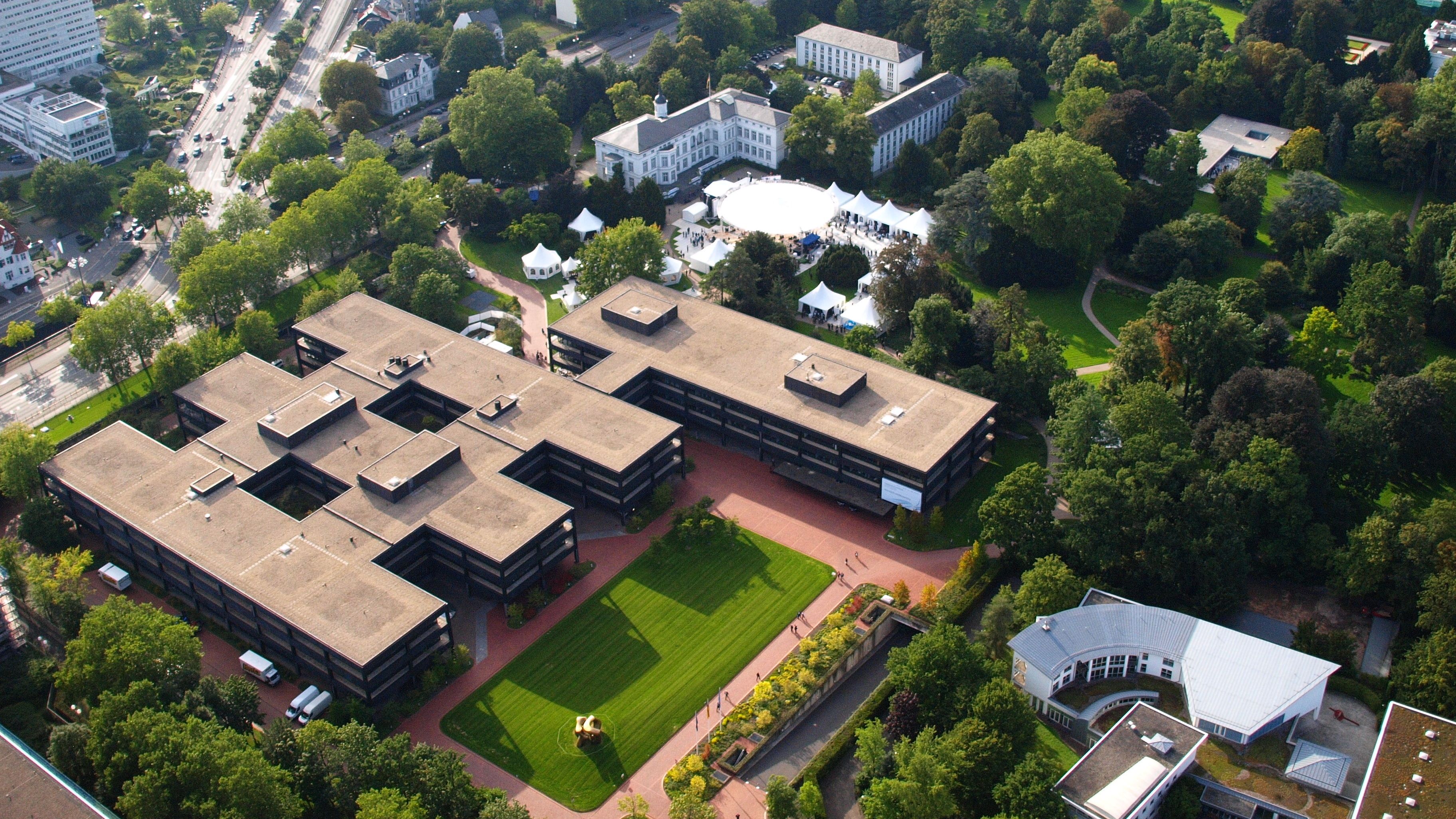 Ehemaliges Bundeskanzleramt, Bonn: Luftaufnahme